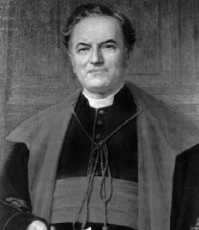 Paulin Ladeuze (1870-1940) - rector KUL (1909-1940)